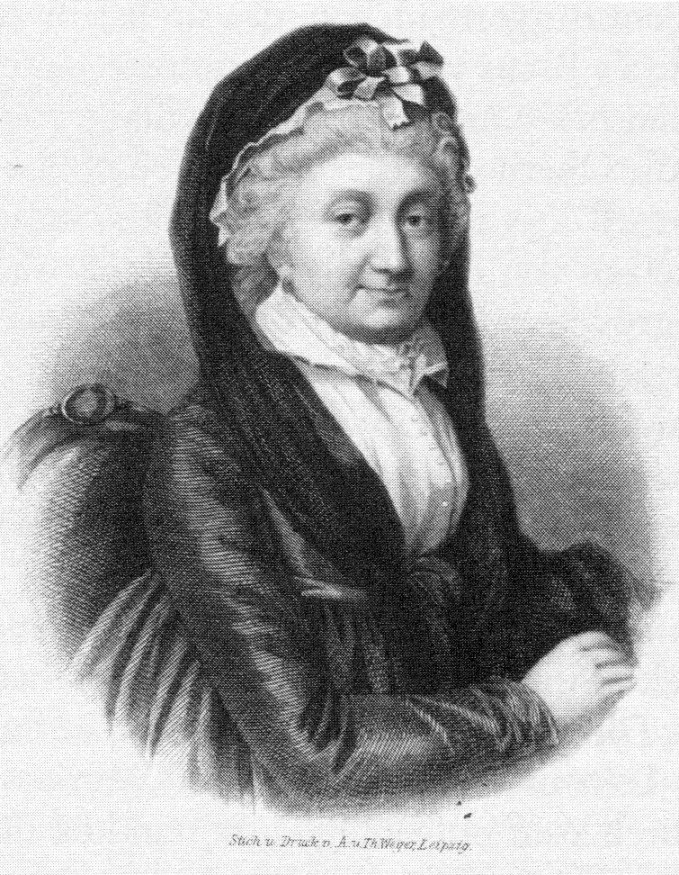 Portrait of Sophia Gräfin von Voss, tutor of Louise of Mecklenburg-Strelitz, Queen of Prussia. Engraving.